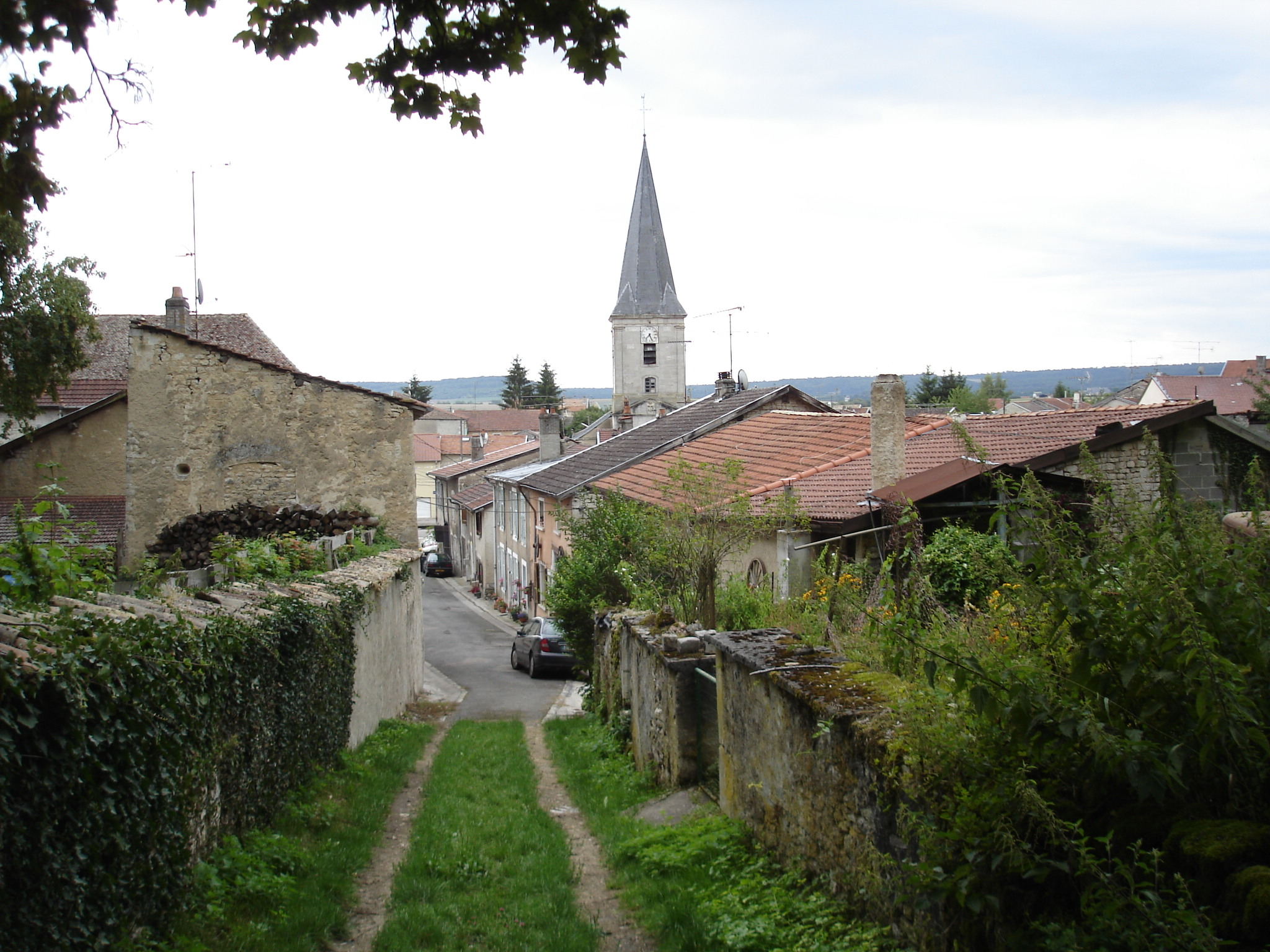 Rue de l'ancien cimetière à Maxey-sur-Vaise (Meuse)